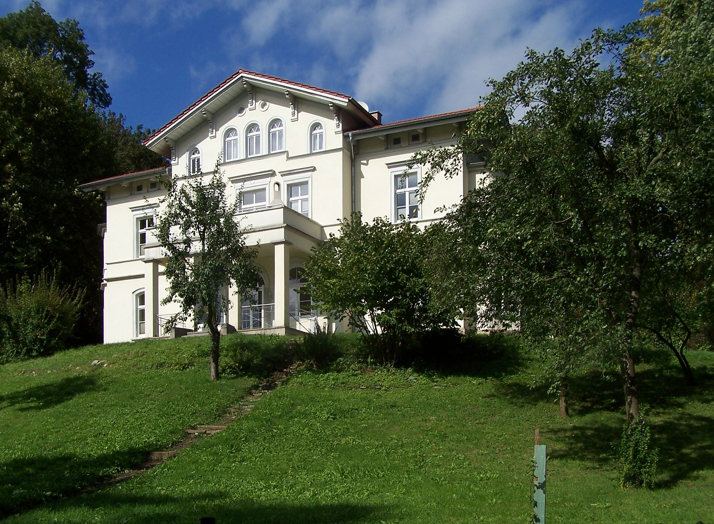 Die Villa Karolinenstraße 33 in Eisenach wurde ab 1870 vom Eisenacher Industriellen und Mäzen Julius von Eichel bewohnt. Sie befindet sich auf halbenen Wege zwischen der ehemals zum Familienbesitz gehörenden Villa Pflugensberg und dem Landhaus Dürrerhof.